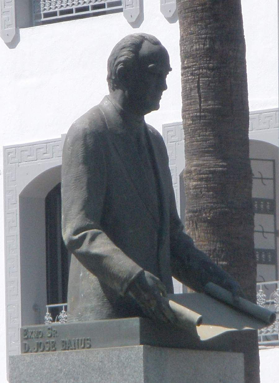 Monumento a José Banús en Puerto Banús (Marbella)